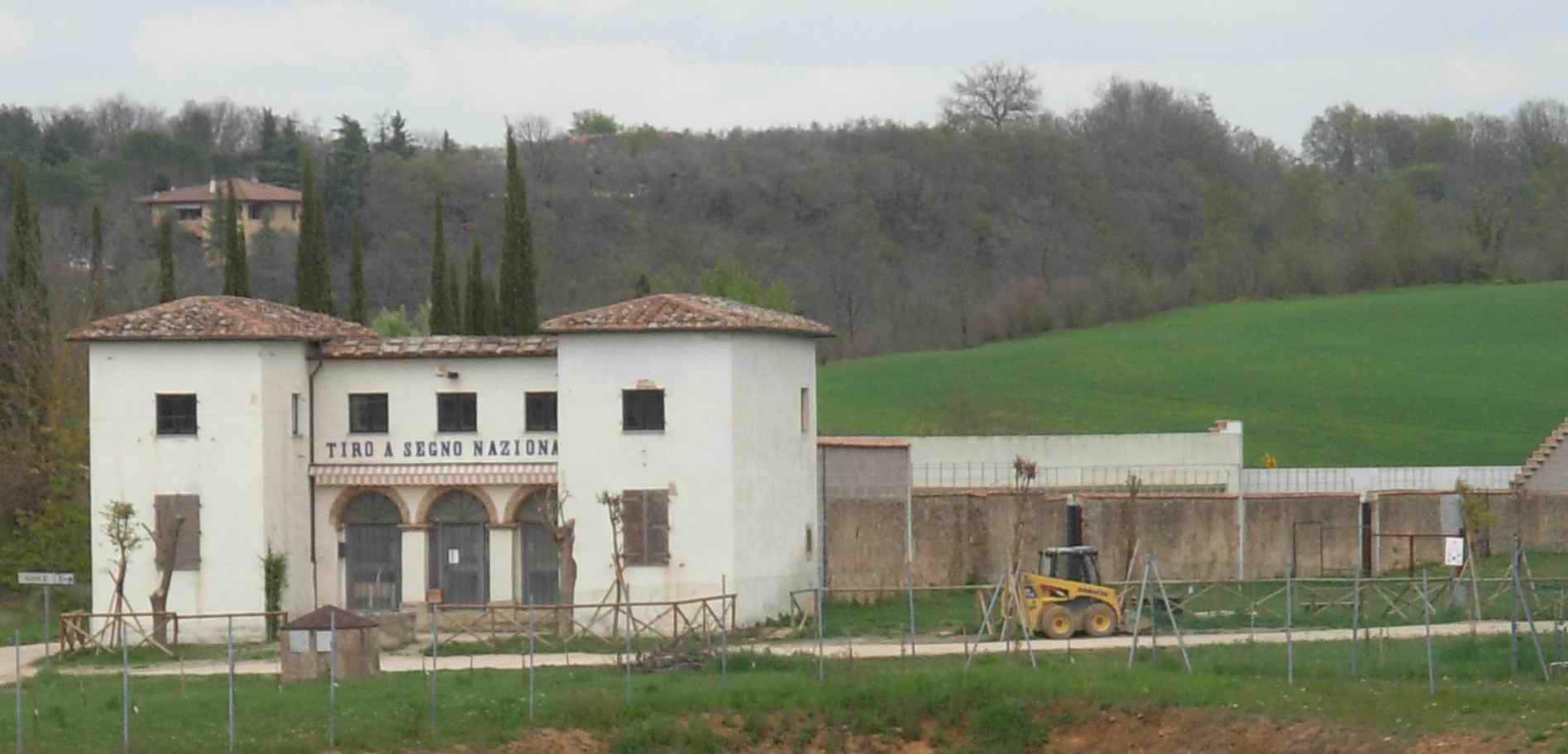 Colle di Val d'Elsa (Siena - Italia): l'impianto di Tiro a Segno